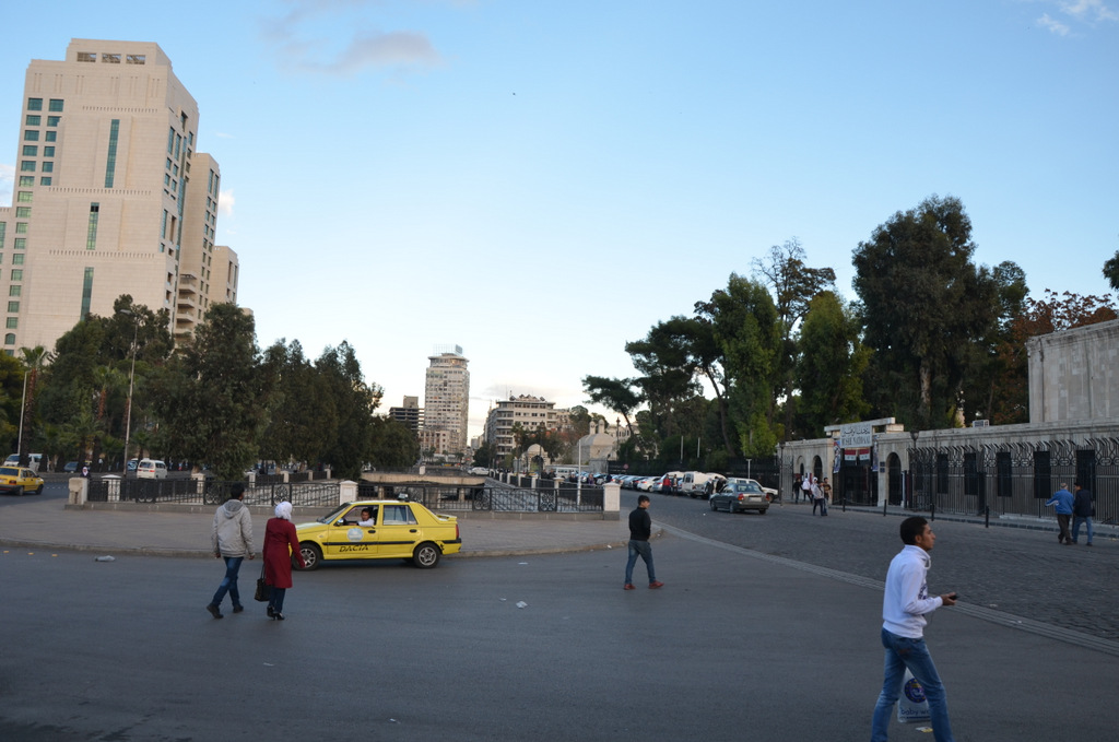 جانب المتحف الوطني قرب مجرى النهر